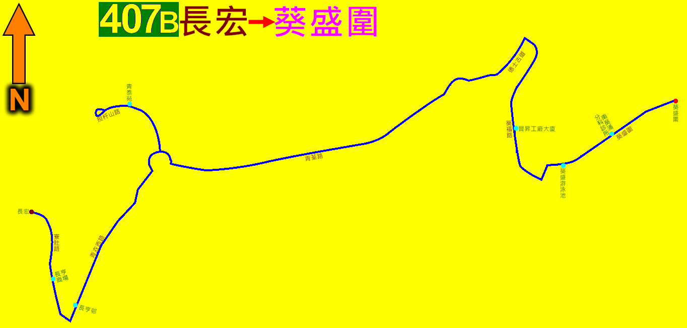 中文（香港）: 新界專線小巴407B線的走線圖